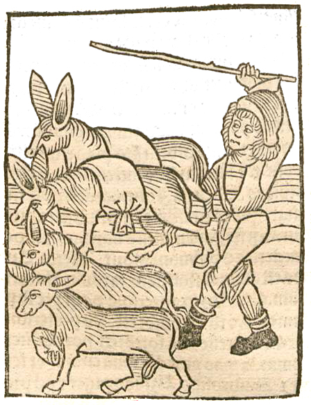 Abbildung zum Kapitel Asinus - Esel